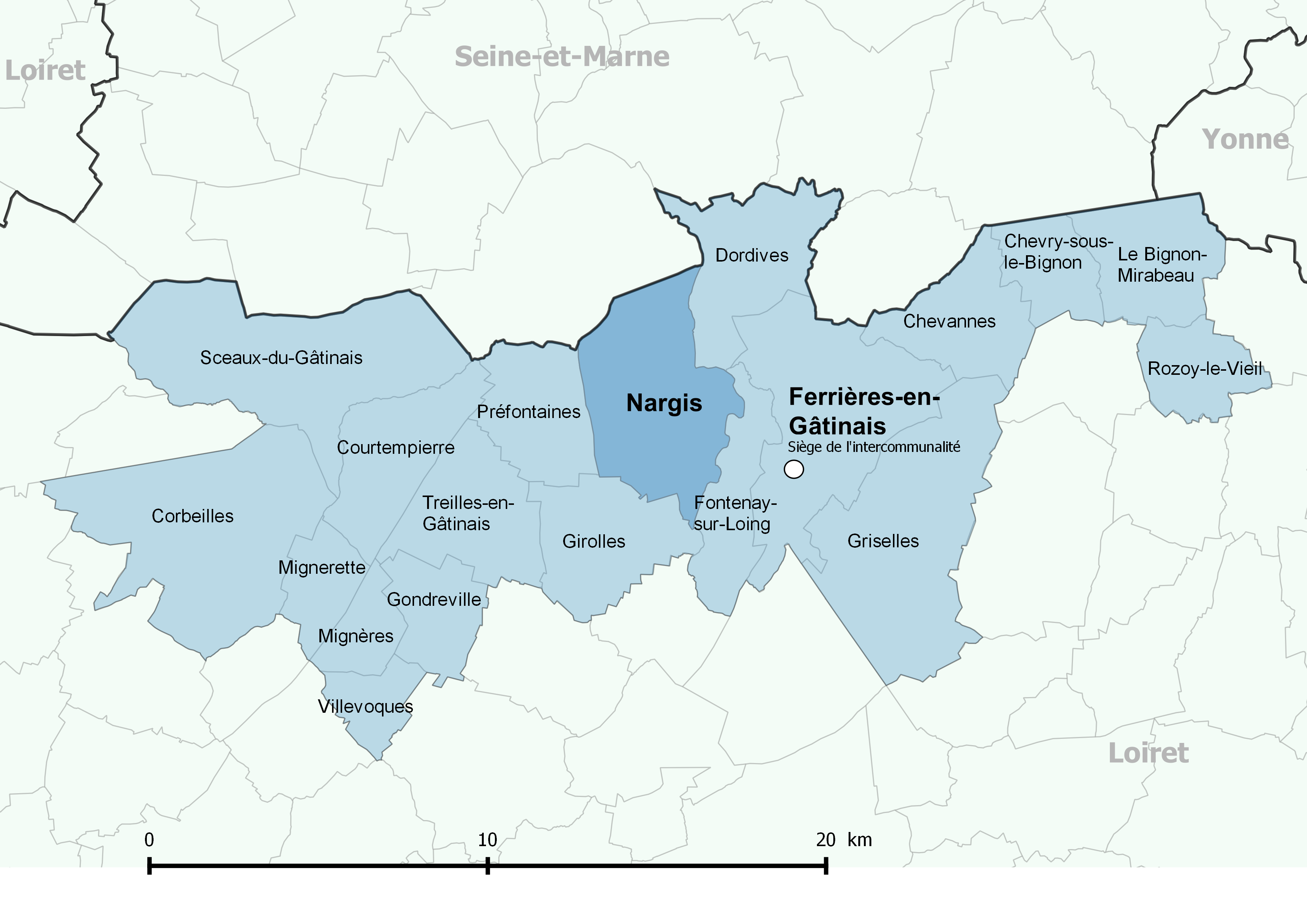 Périmètre de la communauté de communes des Quatre Vallées (Loiret) - Positionnement de la commune de Nargis.